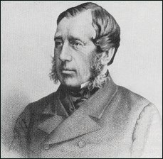 Portrait de Jules Van Praet